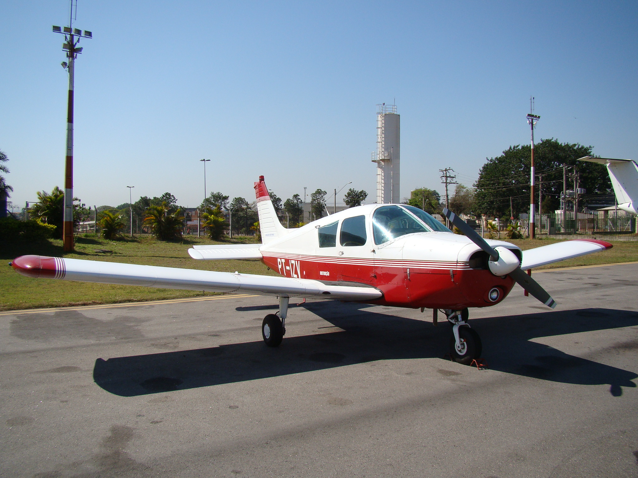 Aeronave: Piper Cherokee (P28A-140) Proprietário: Aeroclube de São Paulo. Matricula: PT-IZV Local da fotografia: Aerodromo de Sorocaba (SDCO)